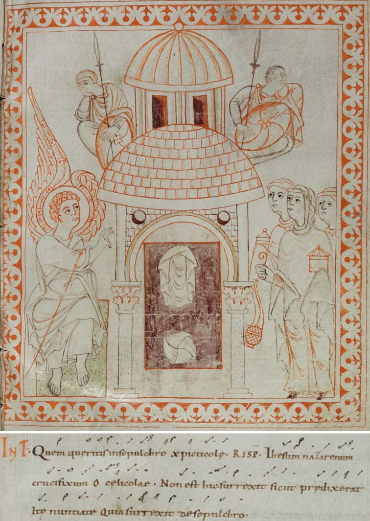 Zusammengefügte Ausschnitte aus dem Cod. Sang. 391, Blatt 33 und Blatt 37: die drei Frauen am leeren Grab und dazu gedichteter Tropus in Dialogform. Karolingische Minuskel von der Hand Hartkers um 990-1000